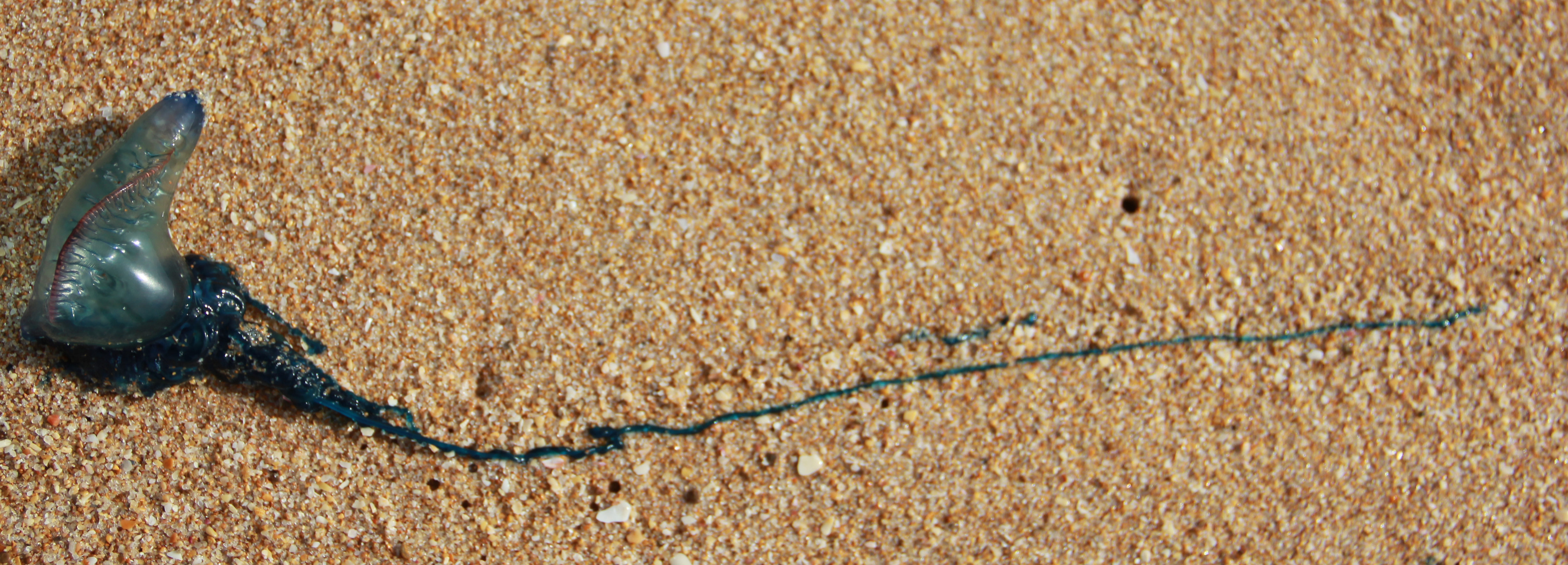 Physalia Physalis am Strand von Conil, spanische Atlantikküste, südlich Cadiz - Conil de la Frontera